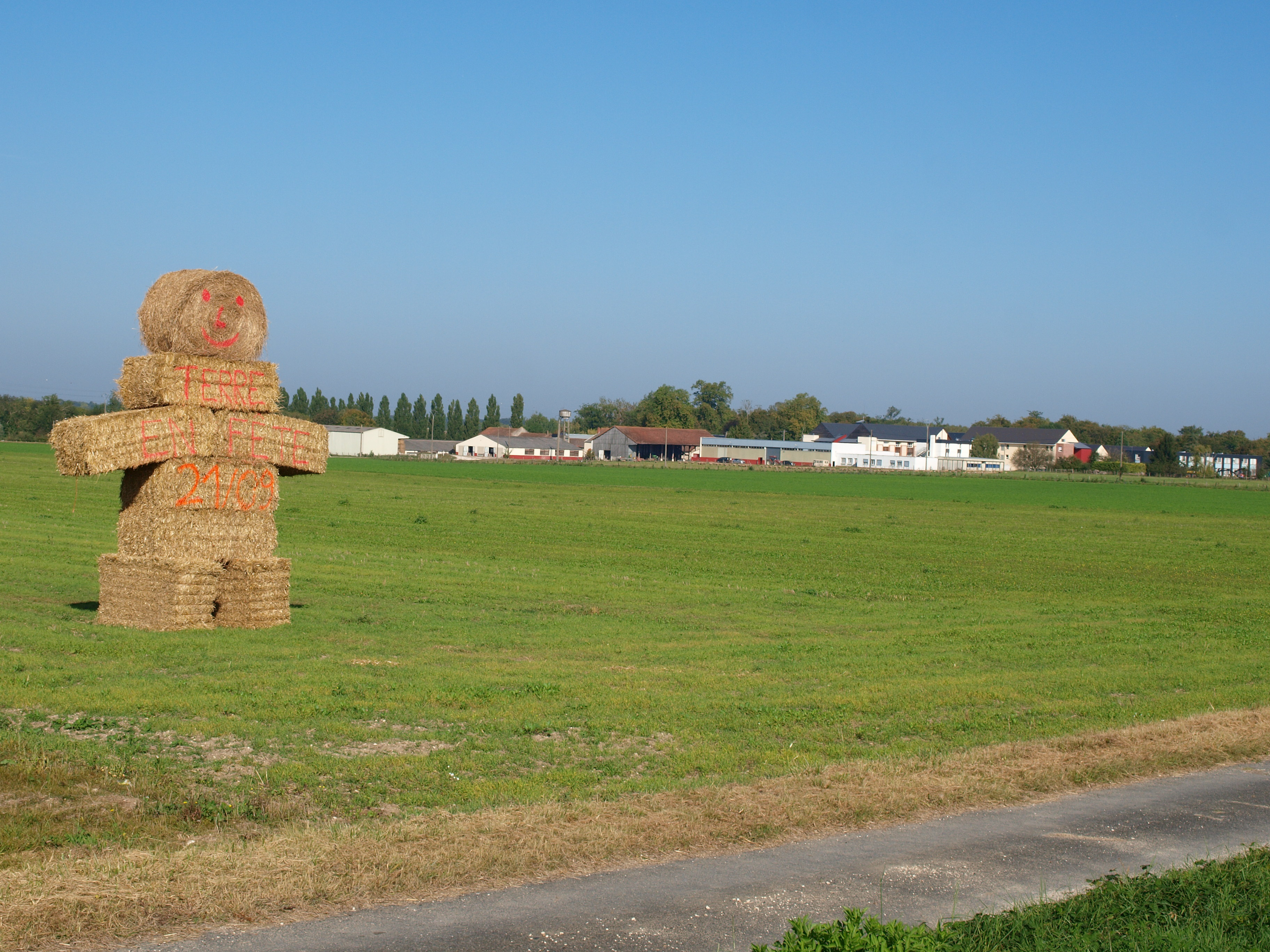 Amilly (Loiret, France) ; Lycée agricole du Chesnoy , Terre en Fête 2014